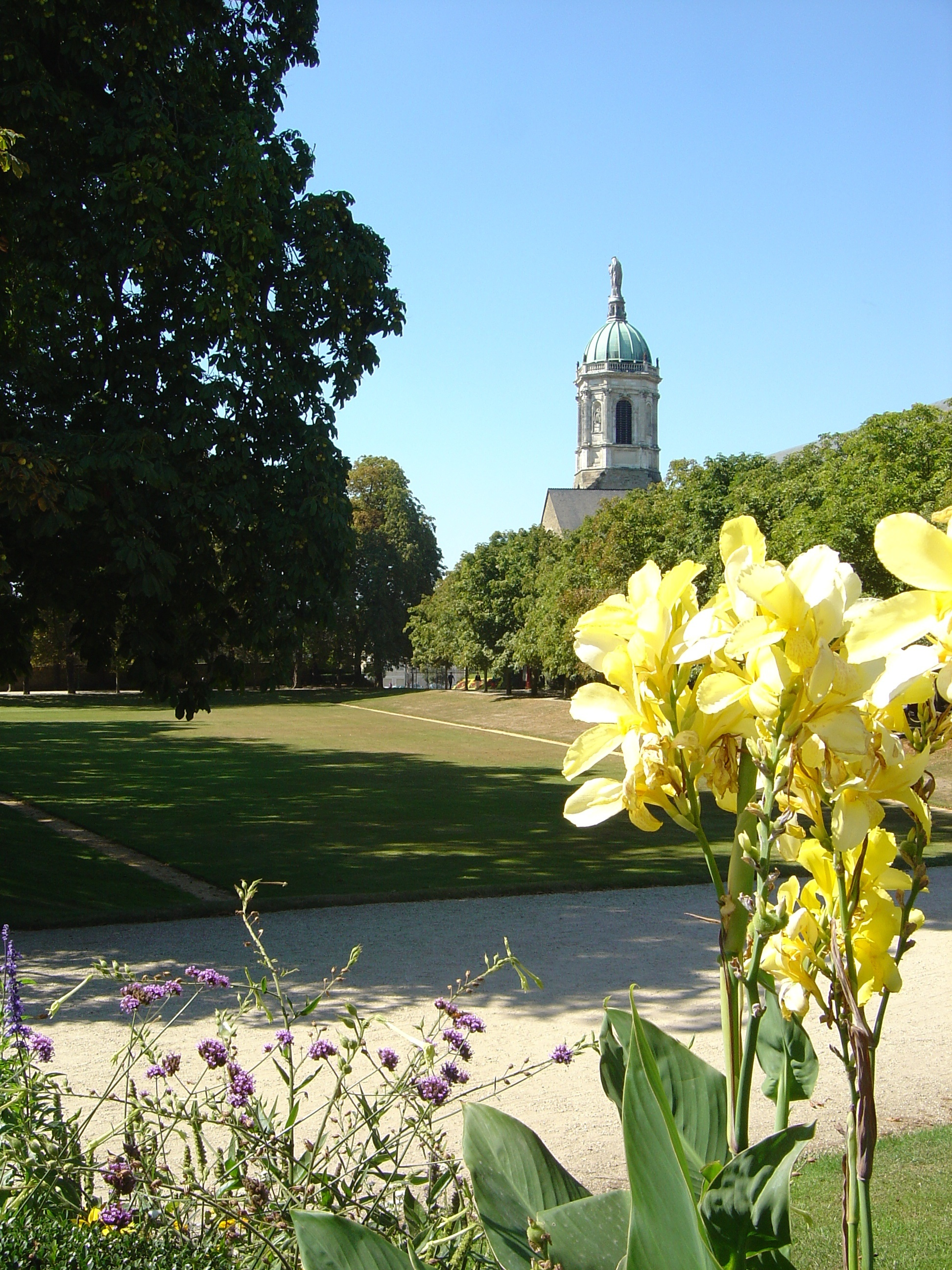 Eglise Saint-Melaine vue du parc du Thabor à Rennes (Ille-et-Vilaine, Bretagne, France).